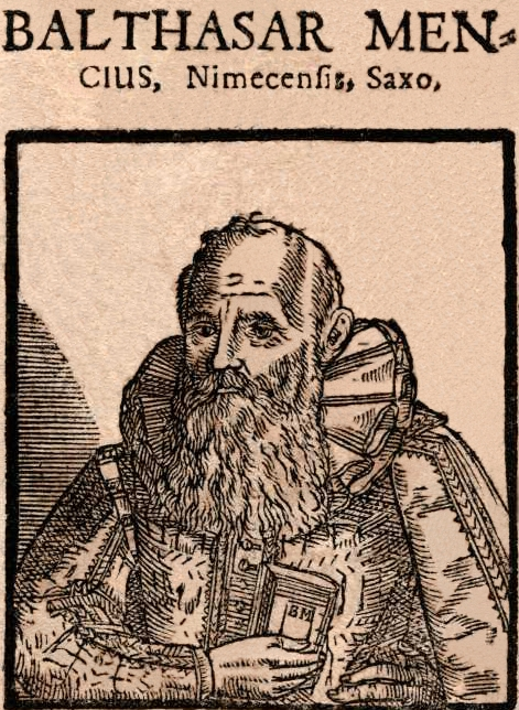 Balthasar Menz d.J. (1537-1617) Historiker, Chronist und Dichter